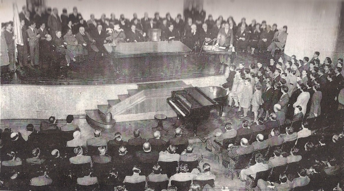 El doctor Ricardo Levene durante la conferencia que pronunció el 23 de septiembre de 1936 sobre la personalidad de Mariano Moreno, en el salón de actos del Colegio, en presencia del Ministro de Justicia, el Rector, profesores y alumnos